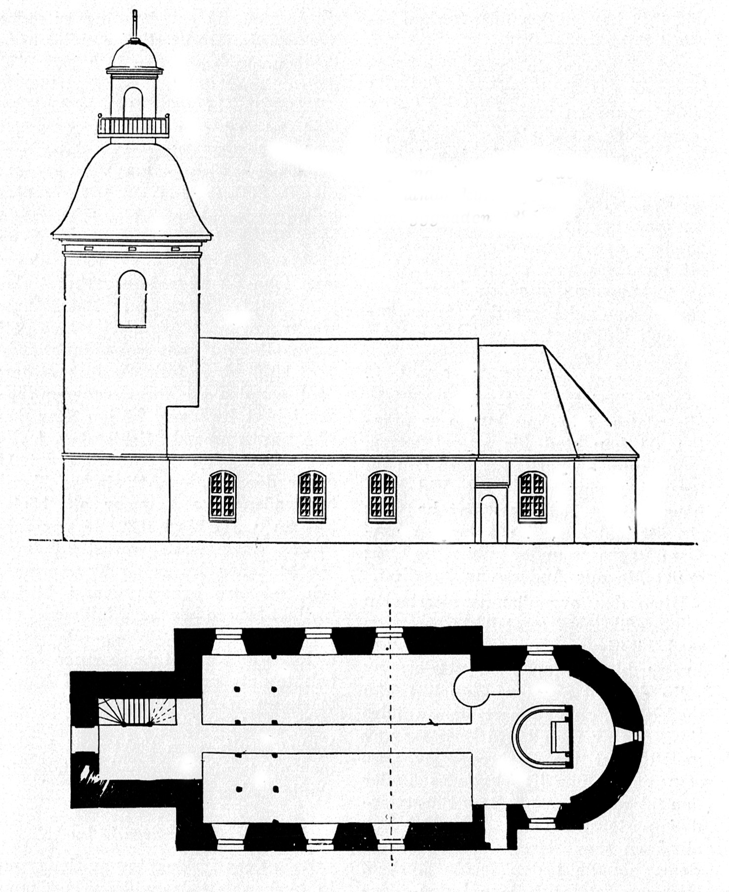 Förlanda gamla kyrka. Uppmätning